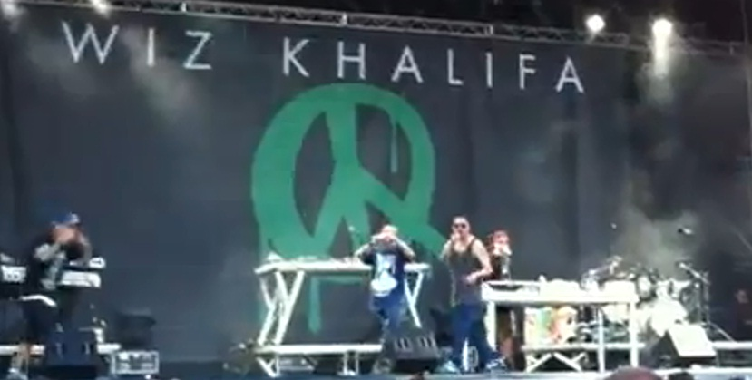 Duke Montana opening Wiz Khalifa's Italian tour in Milano